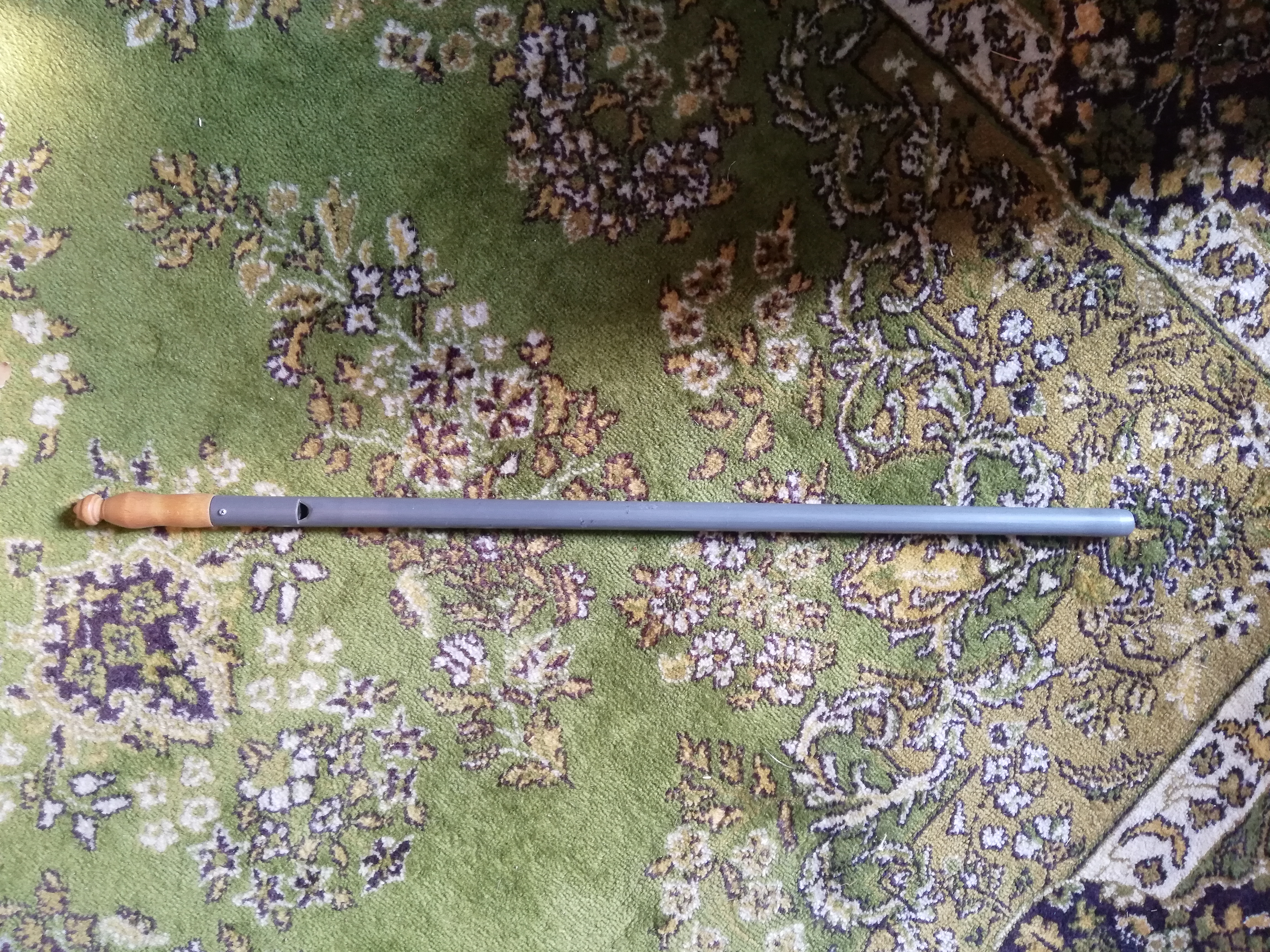 Suomalainen pitkähuilu (rakentanut Rauno Nieminen)